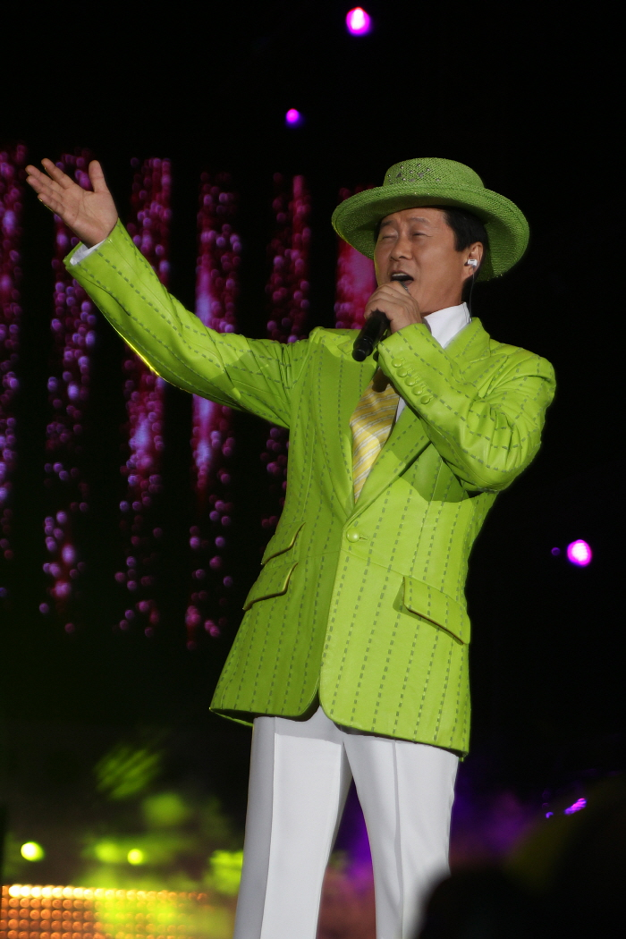 가수 태진아